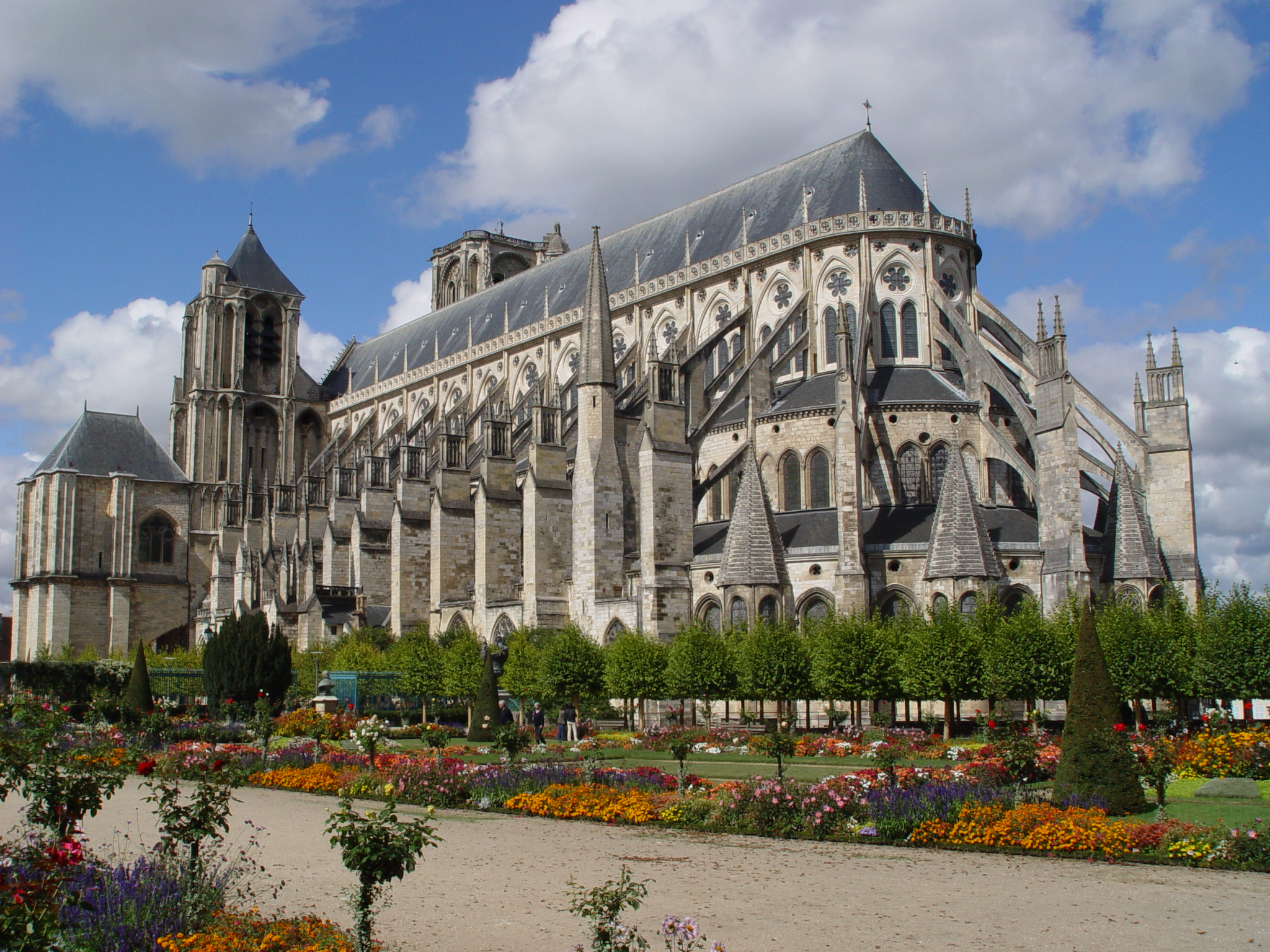 Cathédrale Saint-Étienne de Bourges, vue depuis les jardins de l'archevêché en septembre 2006